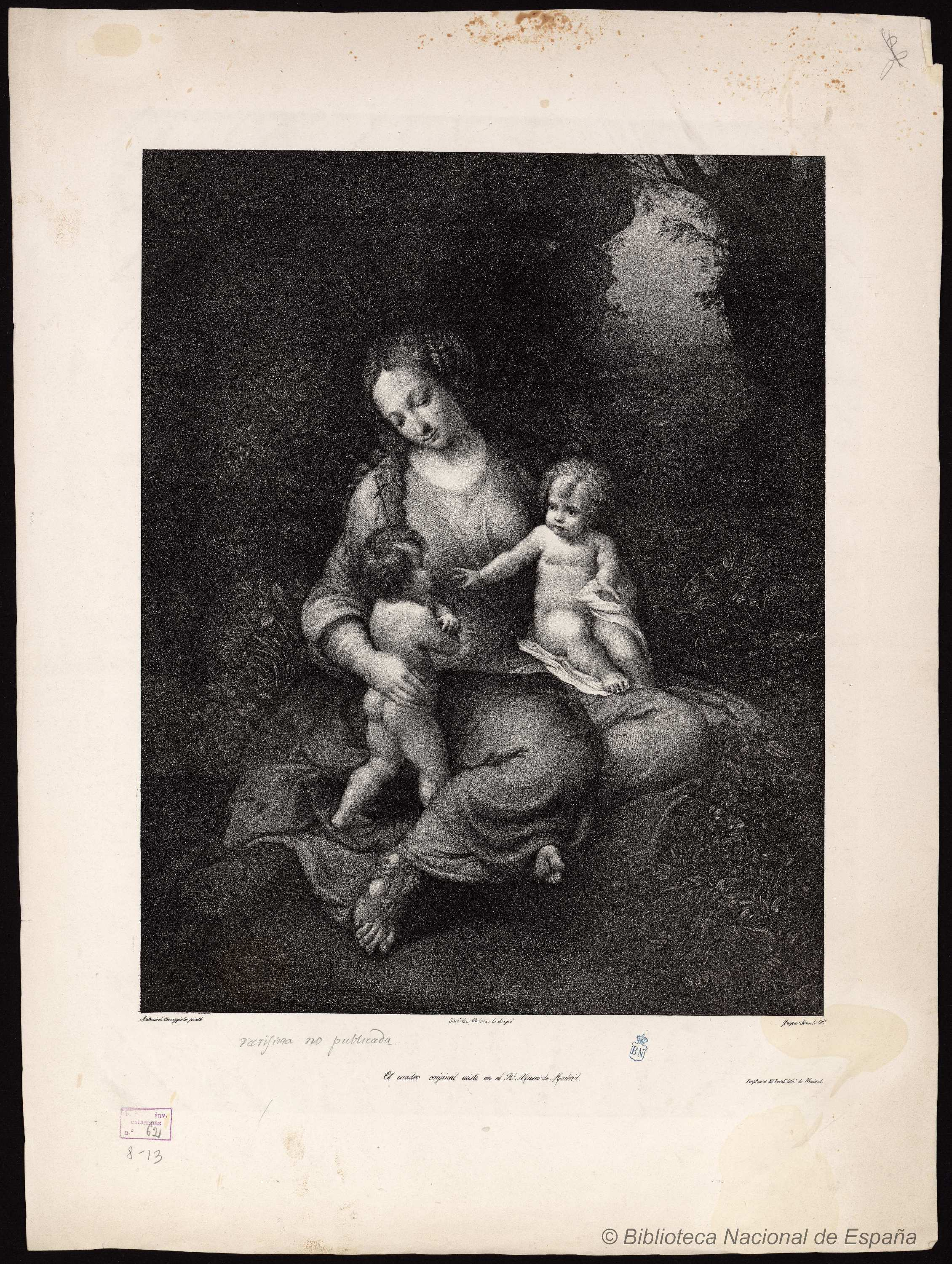 Virgen con el Niño y san Juan, Antonio Correggio lo pintó; José de Madrazo lo dirigió; Gaspar Sensi lo litº. Estampa litográfica. Madrid, Biblioteca Nacional de España